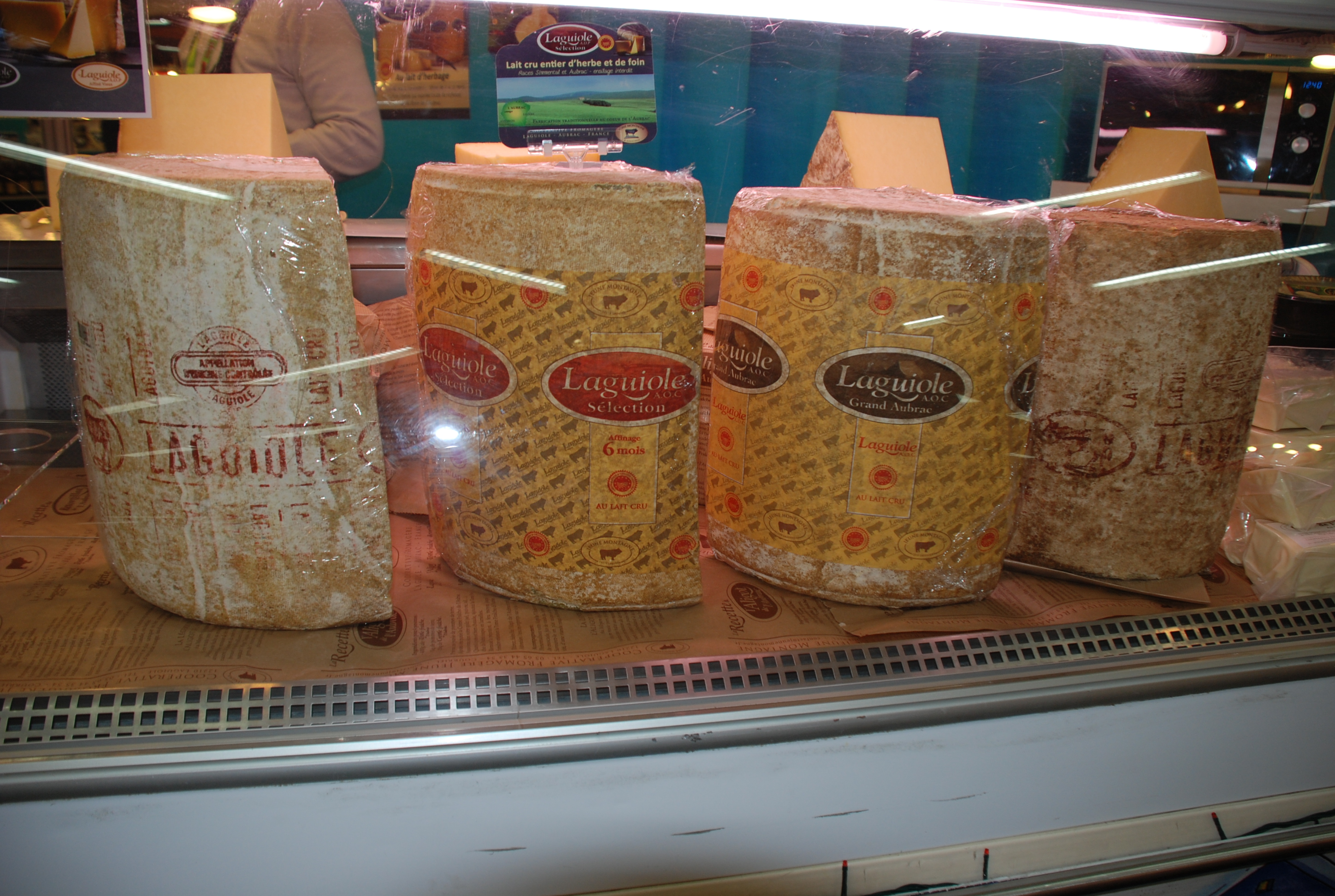 Fromage de Laguiole AOP : stand de la coopérative Jeune Montagne au SISQA 2013 Toulouse